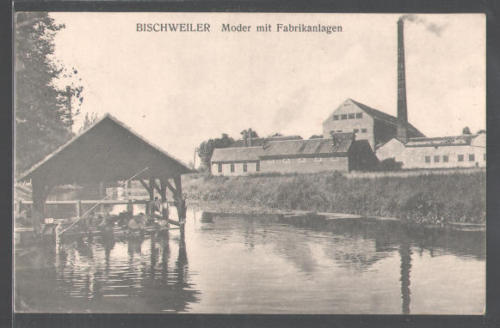 Carte postale ancienne de Bischwiller d'avant la Première Guerre Mondiale.